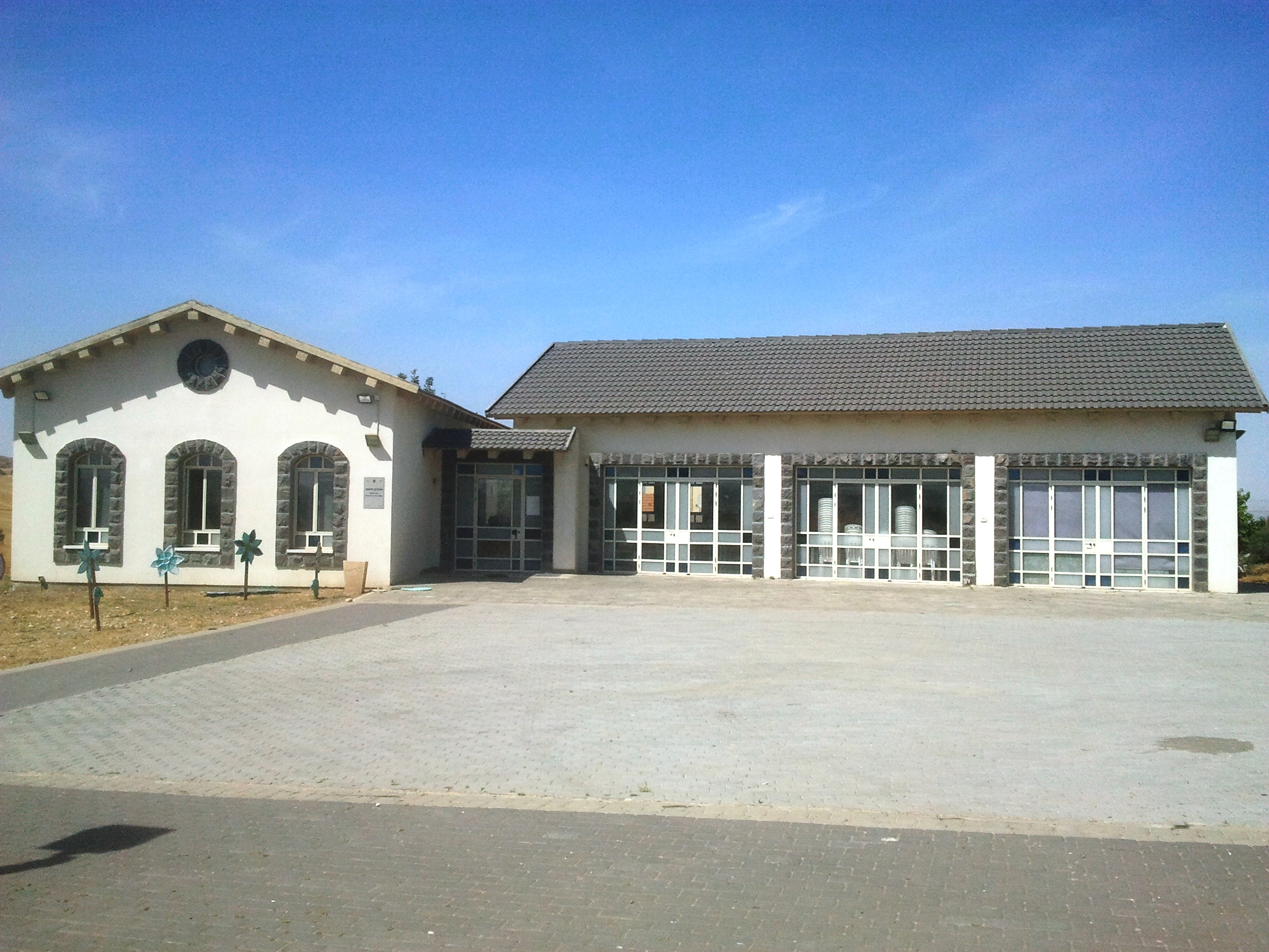 פוריה עילית הוא יישוב קהילתי באזור הצפון על רכס פוריה ליד העיר טבריה, השייך למועצה אזורית עמק הירדן. מבנה מועדון היישוב נחנך בספטמבר 2012